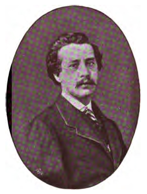 Domenico Majone (1844.1872), in I comici italiani, biografia, bibliografia, iconografia (1897)